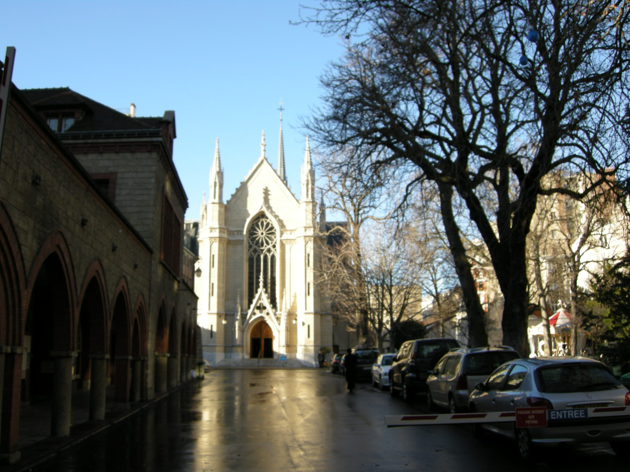 Rue la fontaine, cappella neogotica